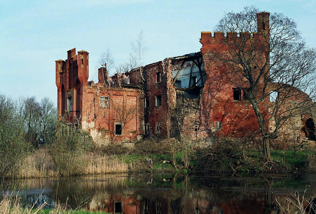 Современное состояние замка Шаакен